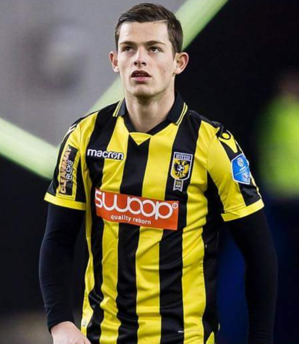 Thomas Buitink